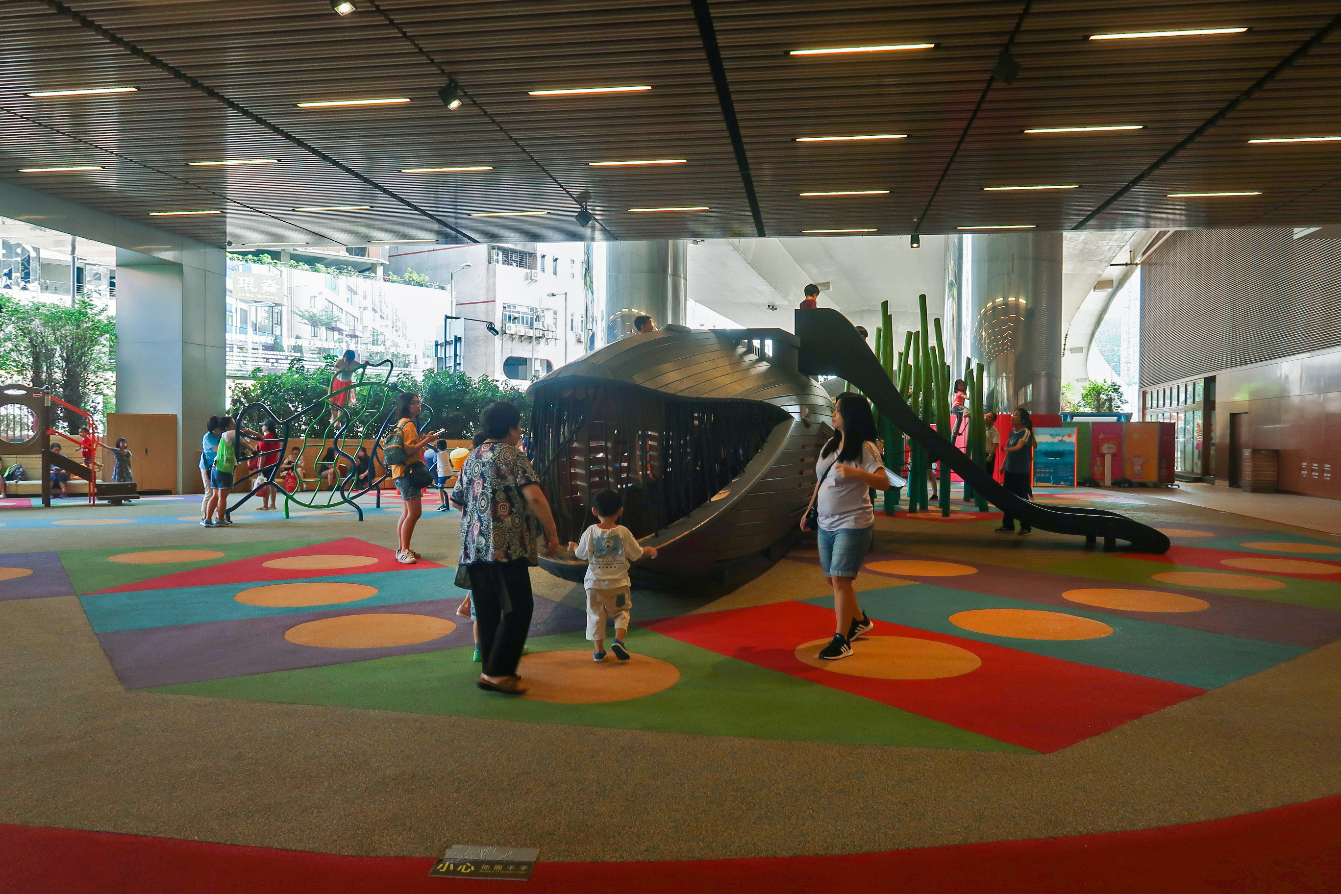 D Park Whale Garden